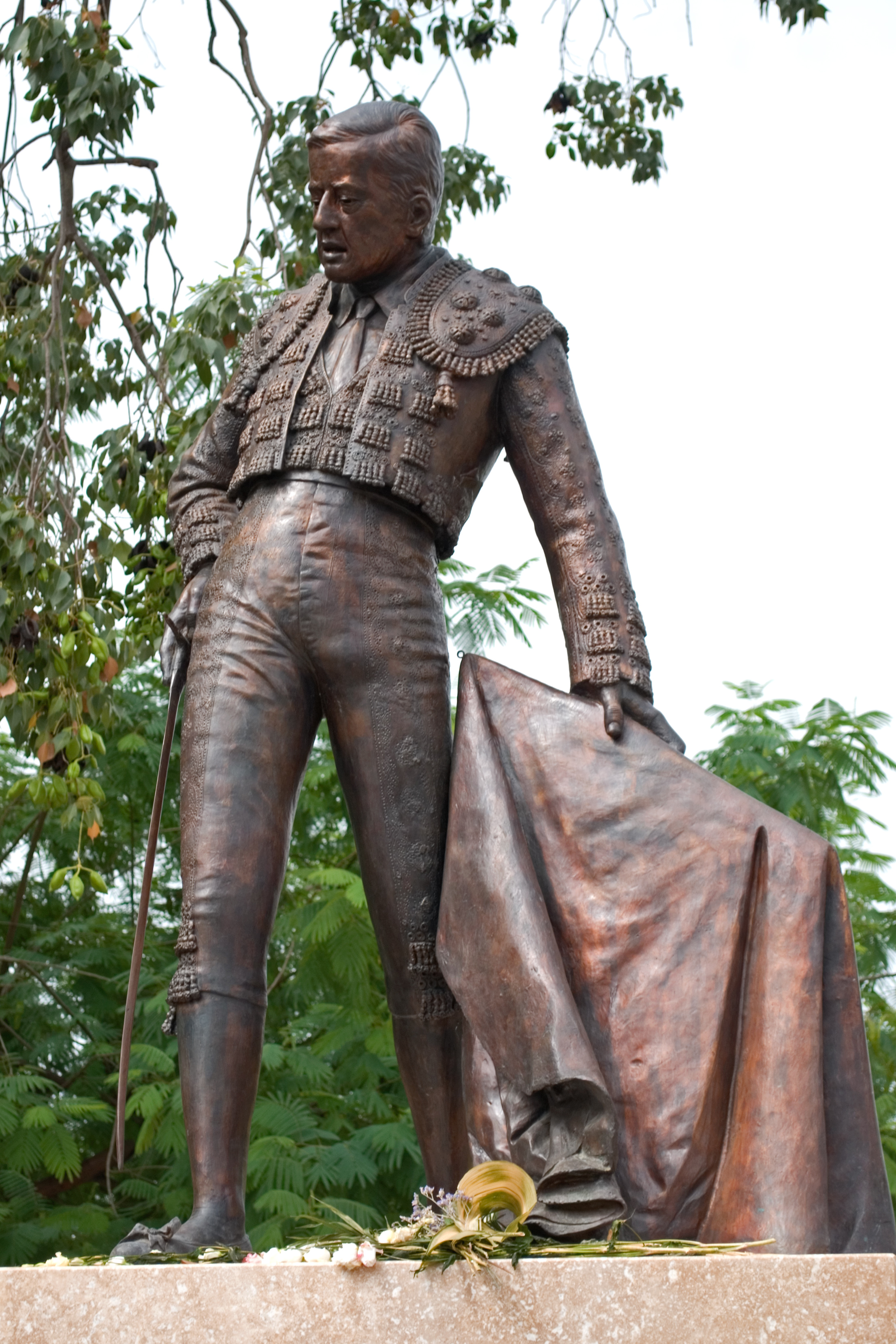 Escultura del torero Manolo Vázquez, en Sevilla, frente a la plaza de toros de la Maestranza.